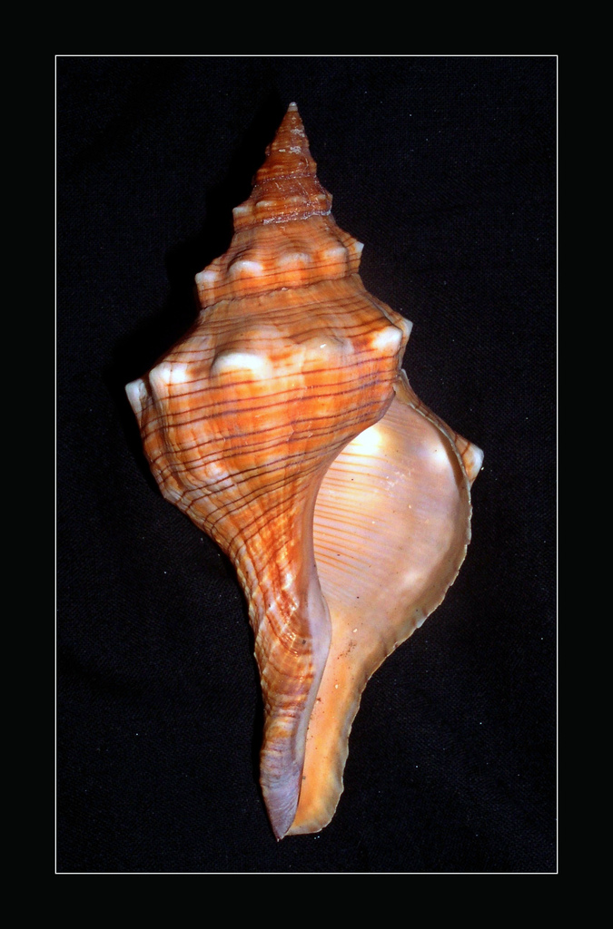 Trapezium Horse Conch - Pleuroploca trapezium